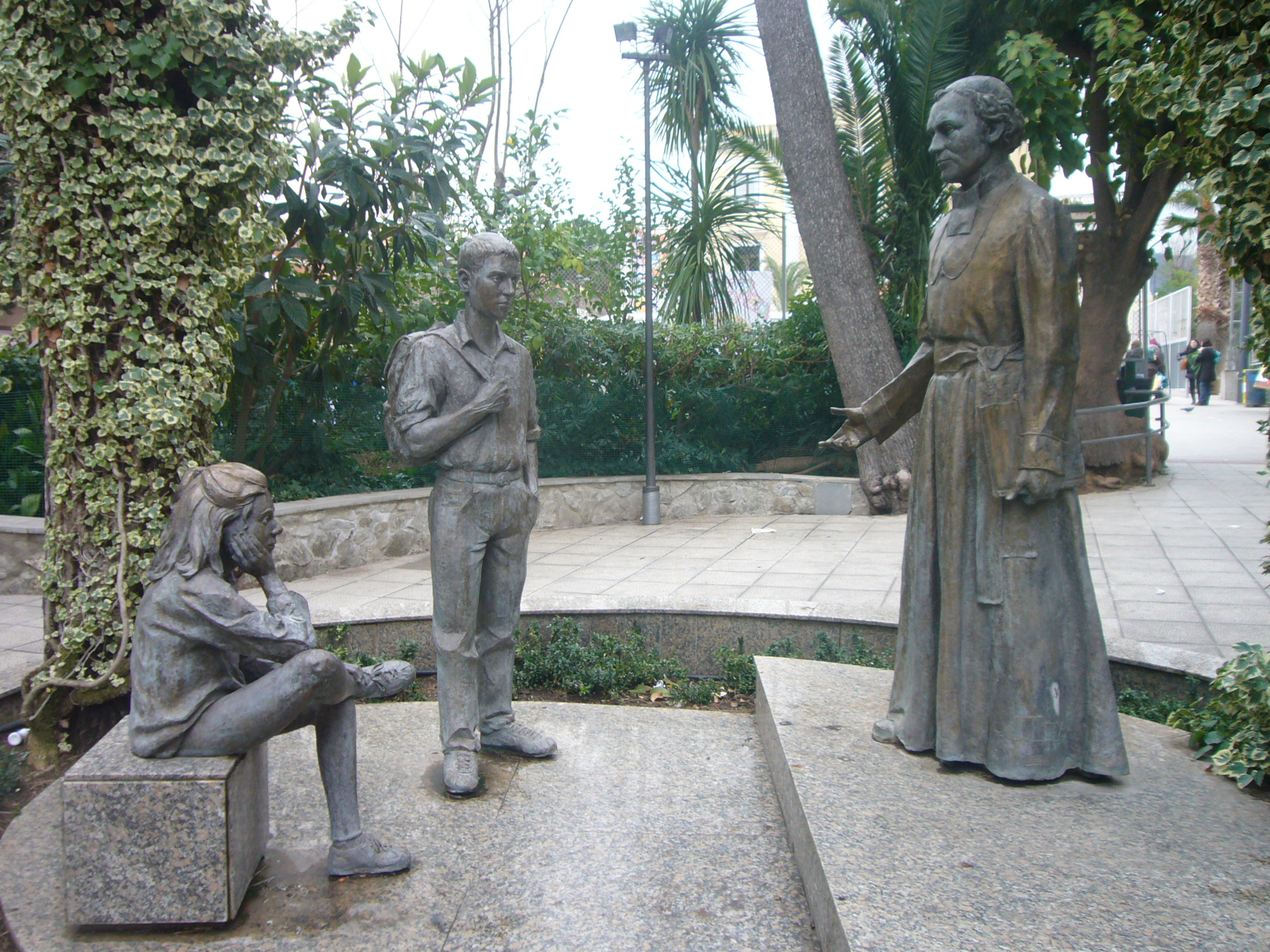 Col·legi Sagrada Família-Horta. Grup escultóric en bronze ‘CONMEMORACIÓN II CENTENARIO’. Germà GABRIEL TABORIN. Barcelona. 21 de Novembre de 1999. Escultor Jorge Egea